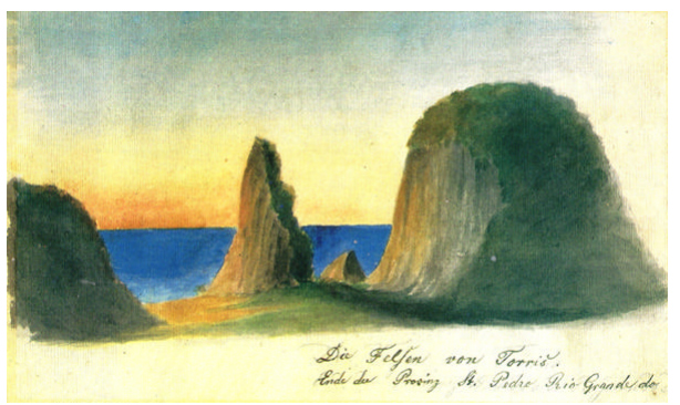 um dos primeiros registros visuais de Torres